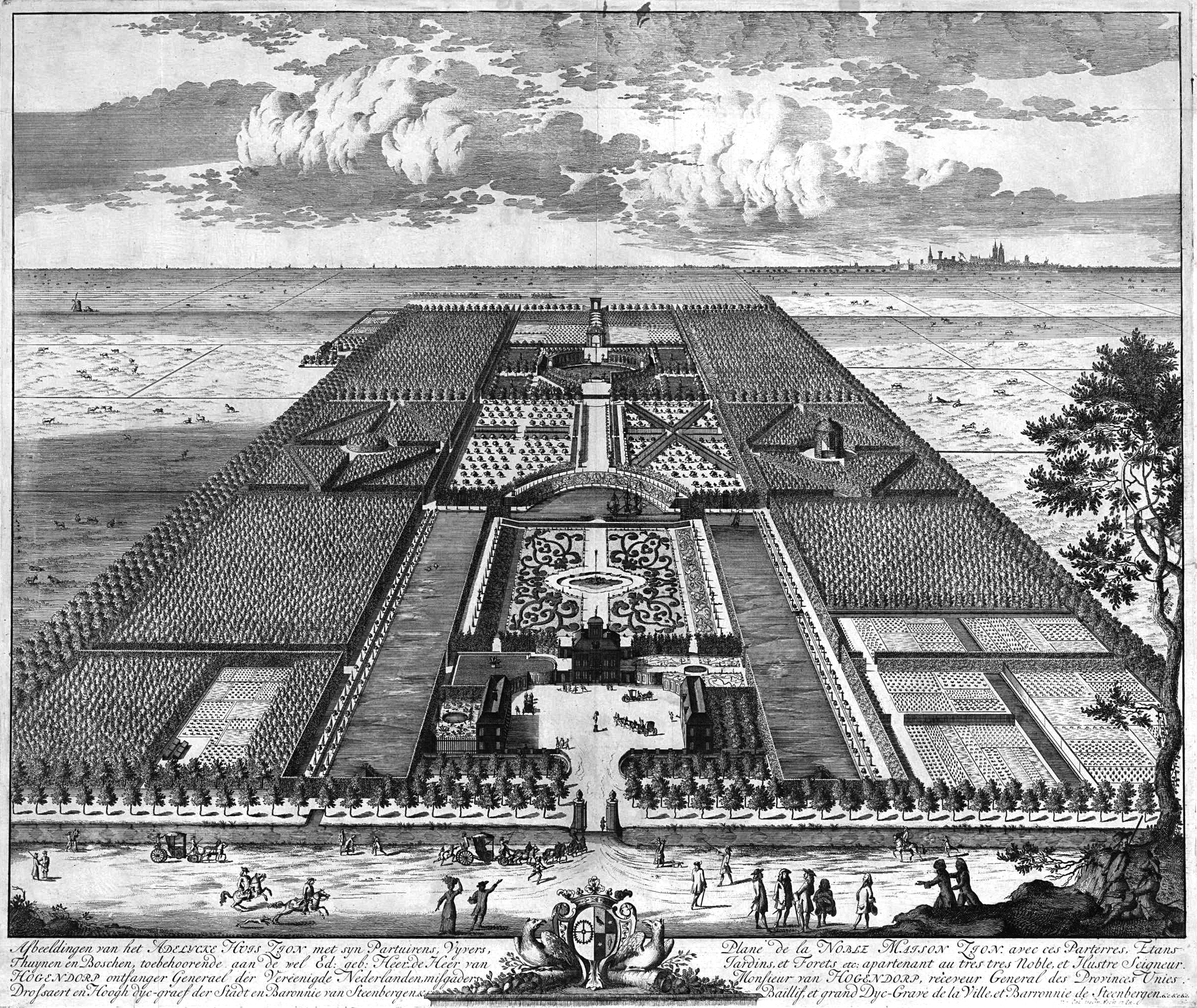 Vogelvlucht perspectief van het buiten Sion te Rijswijk. Het diepte-effect is overdreven. Het grondgebied van de buitenplaats was vrijwel vierkant en ongeveer 250.000 m² groot.